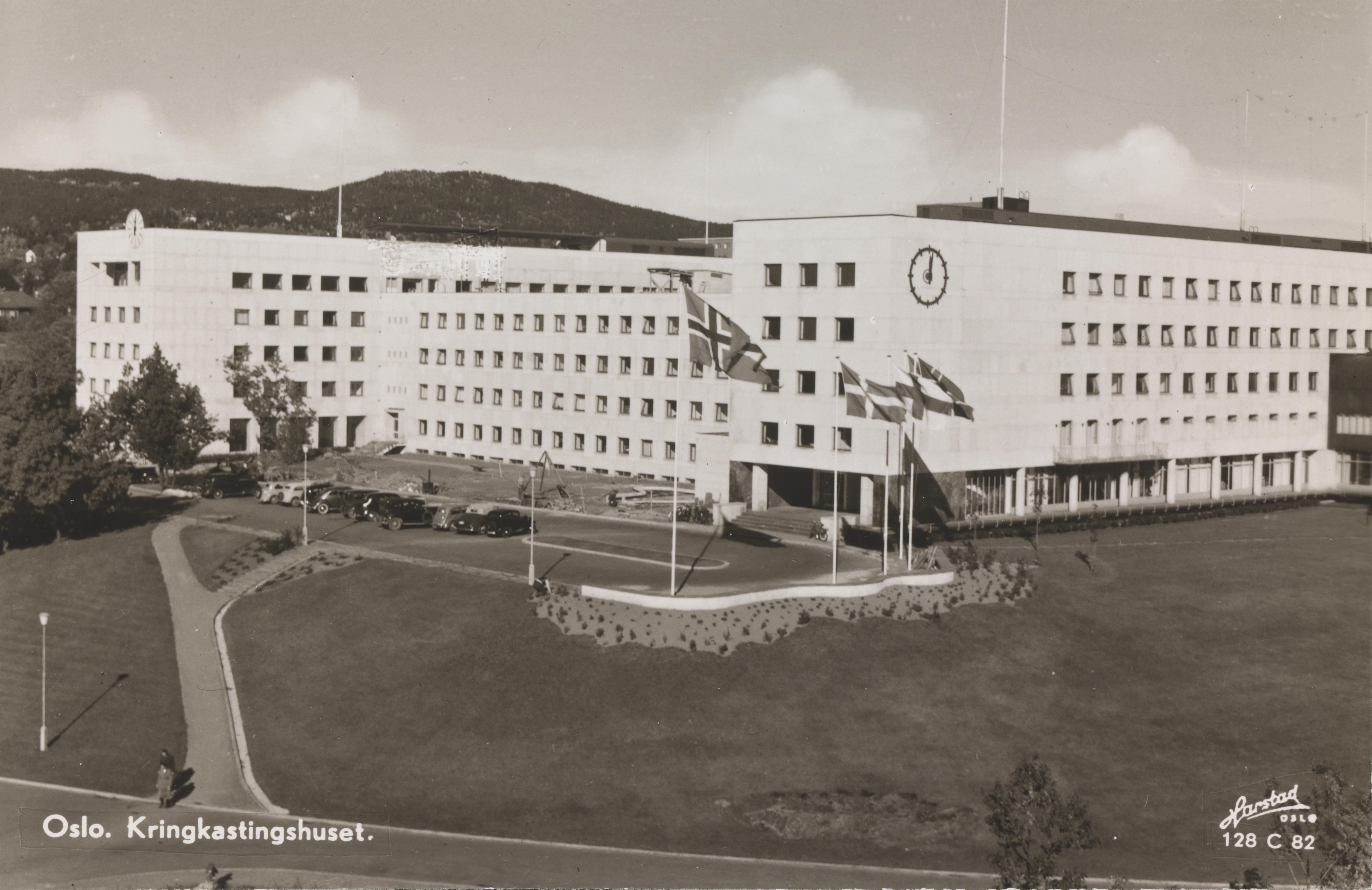 Bildet er hentet fra Nasjonalbibliotekets bildesamling Kringkastingshuset,Marienlyst, Oslo, Oslo